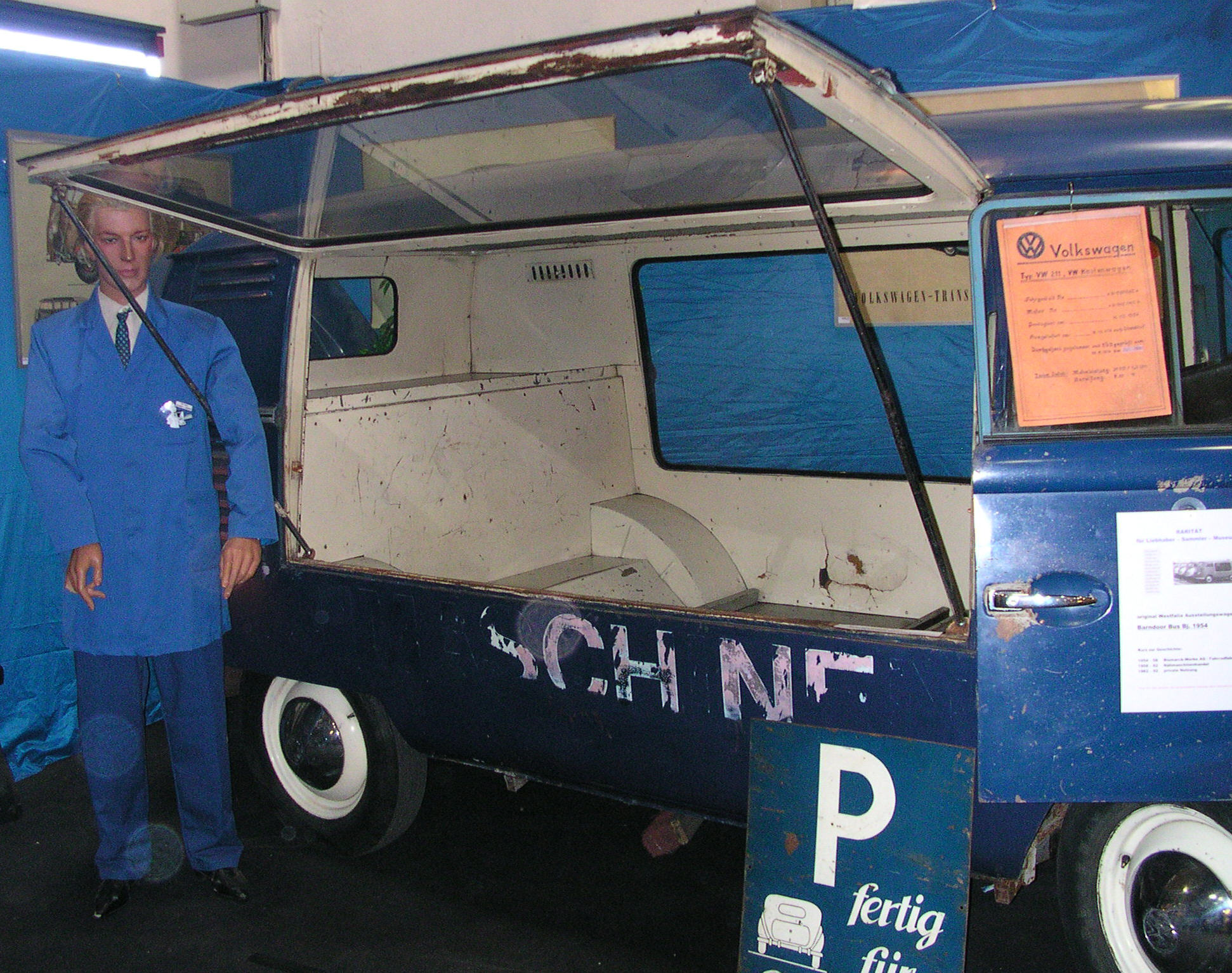 VW-Transporter als Ausstellungswagen von Westfalia, gezeigt in Essen, Technoclassica 2005